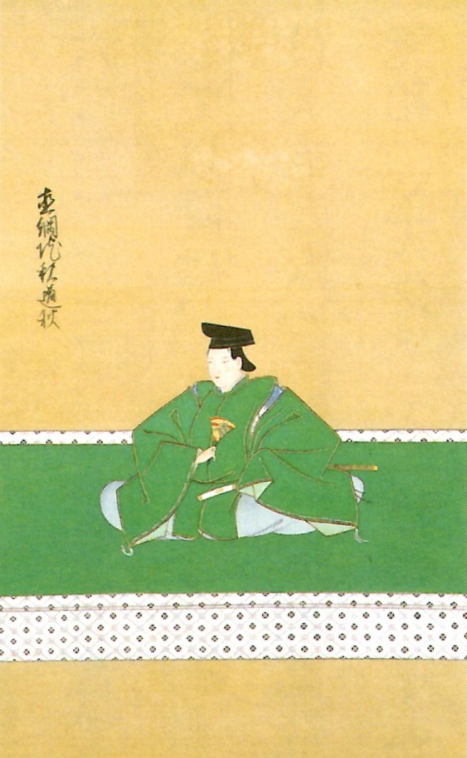 渡辺直綱の肖像。